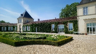 La Chartreuse du Château Paveil de Luze situé à Soussans dans le Médoc